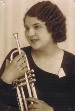 Portret Clara de Vries, door onbekende fotograaf, ongedateerd (Collectie Ronald Vonk).